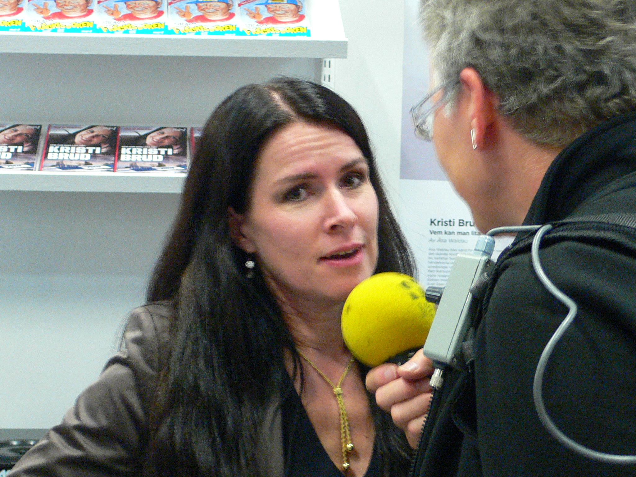 Åsa Waldau at Gothenburg Book Fair 2007, Åsa Waldau på Bok- och biblioteksmässan 2007